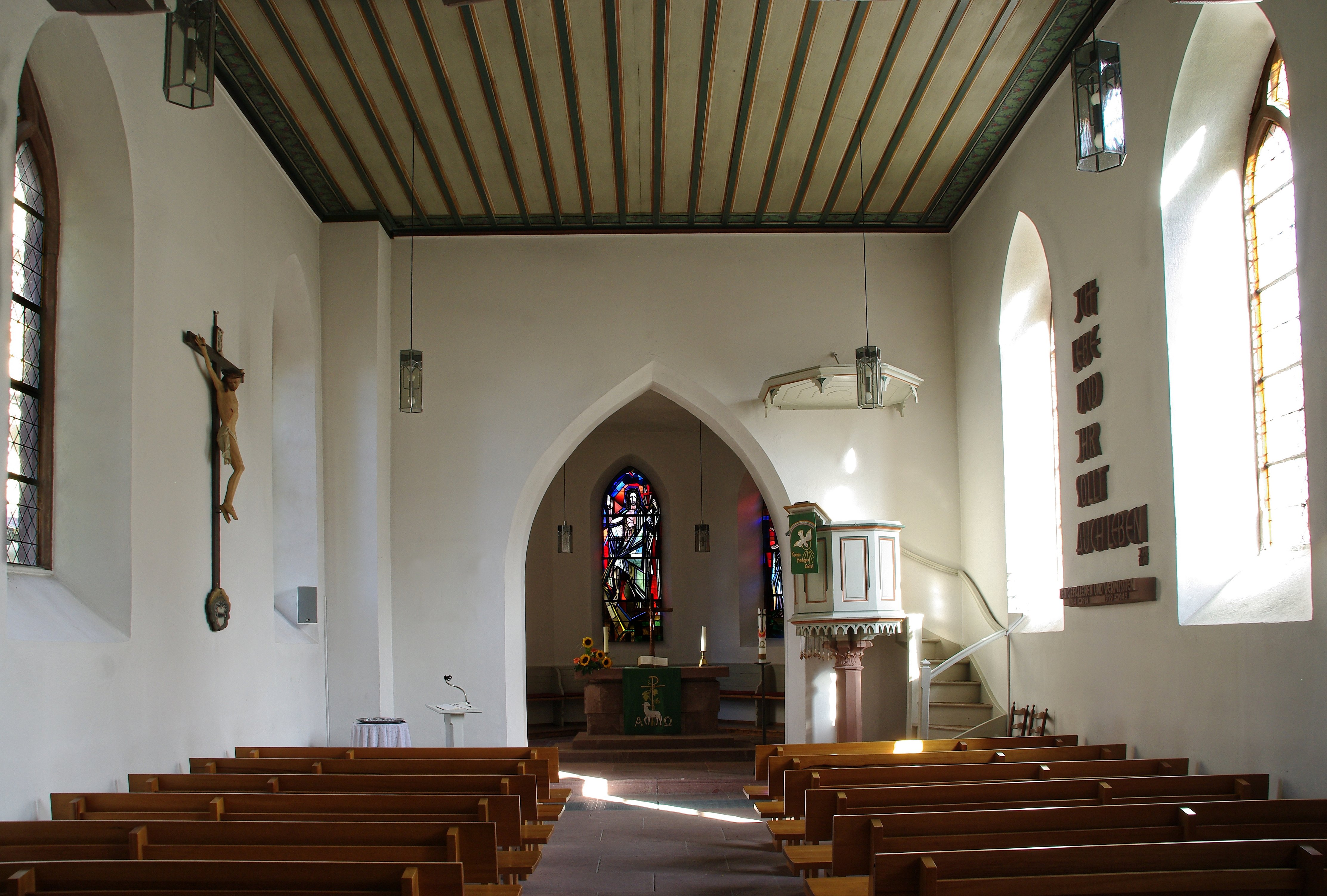 Blick in die Kirche Rictung Altar